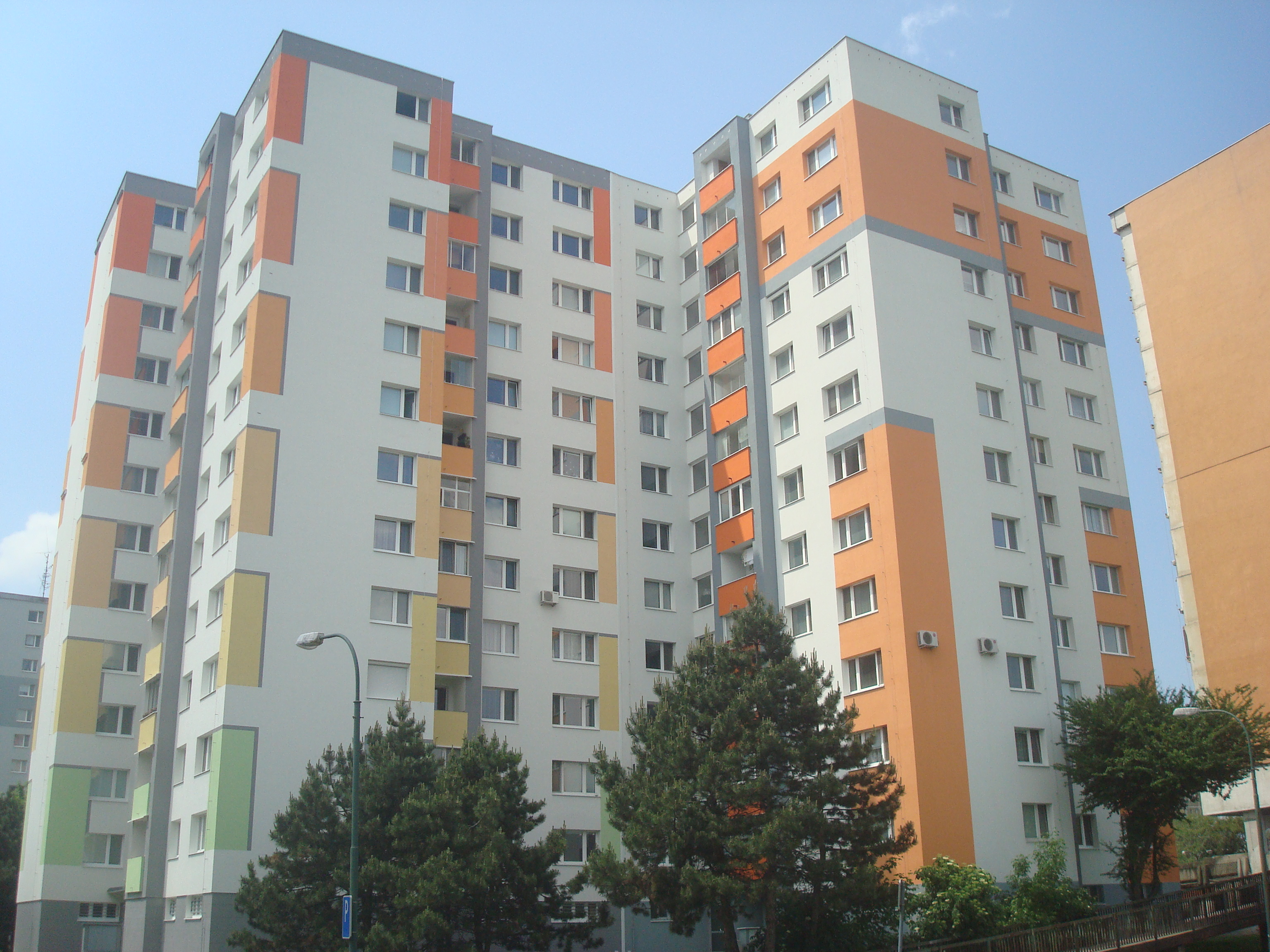 Znievska street house, Petržalka, Bratislava, Slovakia